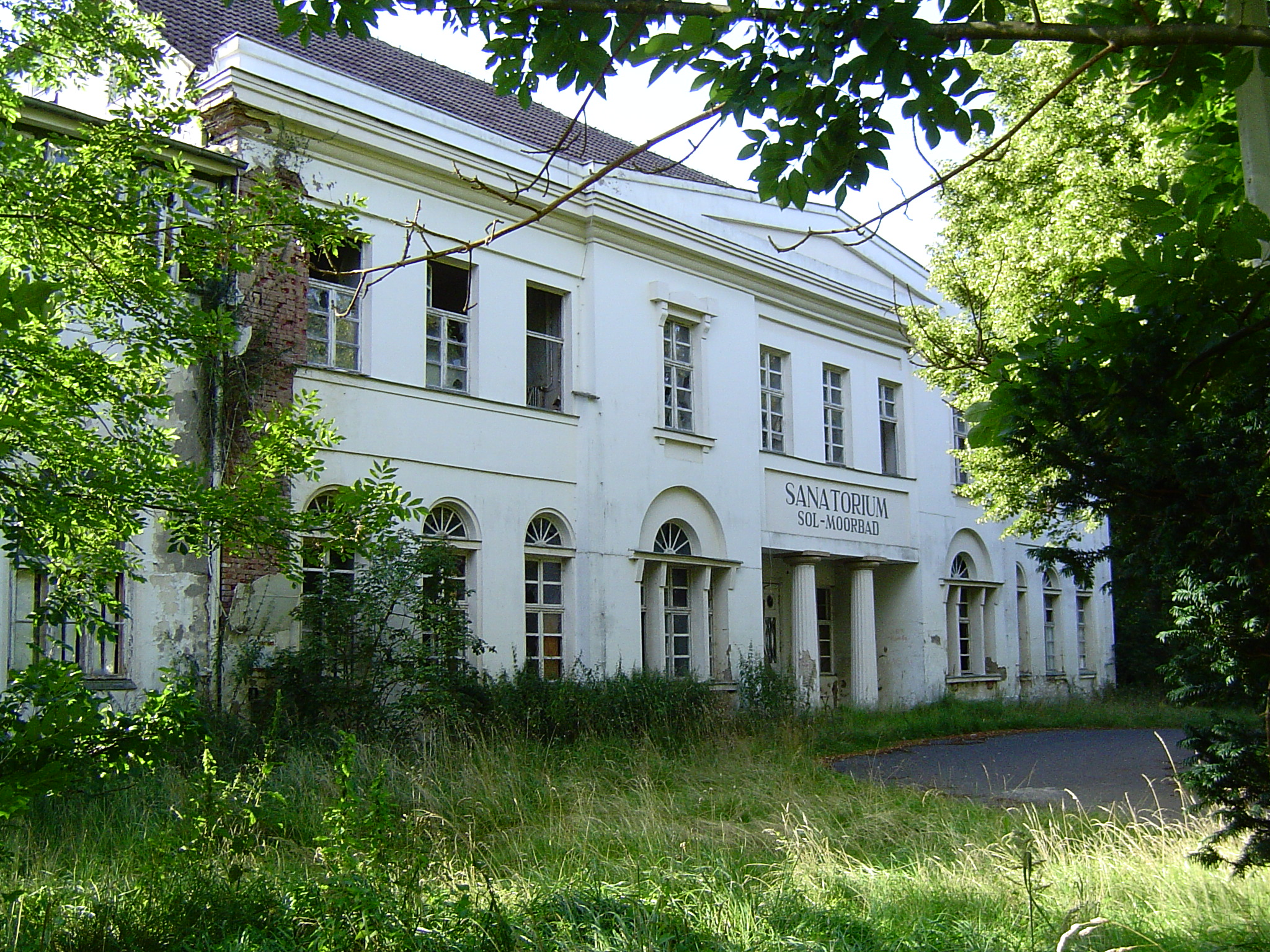 ehem. Kurhaus des Sanatoriums Bad Sülze Sol- und Moorbad Gebäude gegenüber dem Haupteingang